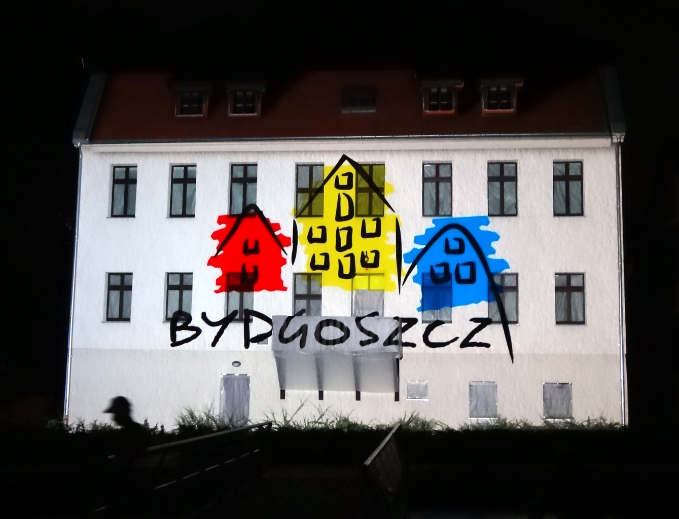 Spektakl światło&dźwięk na Wyspie Młyńskiej w Bydgoszczy